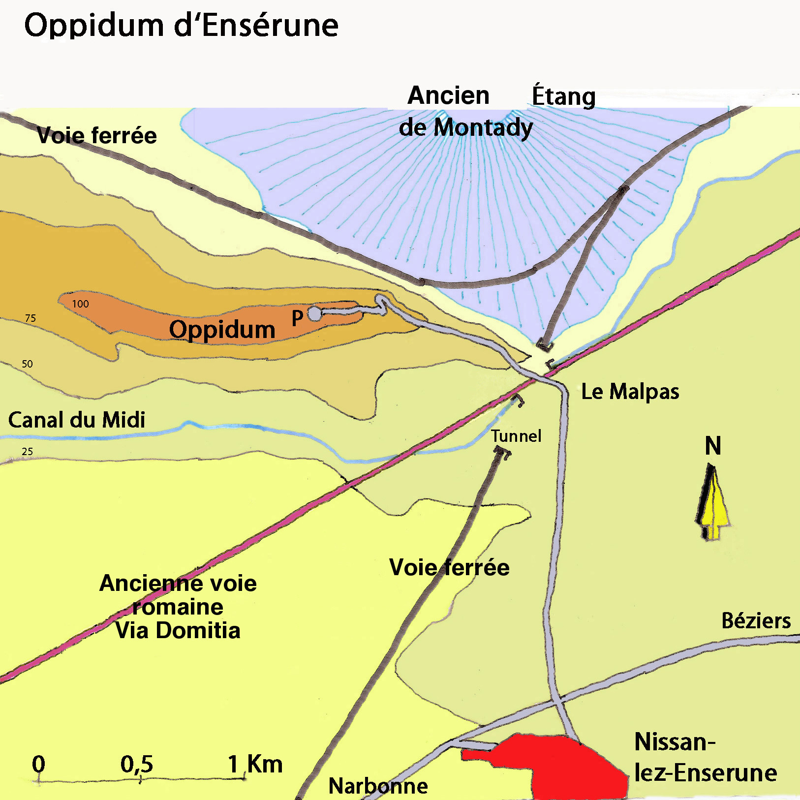 Oppidum d'Ensérune (Hérault) - plan.